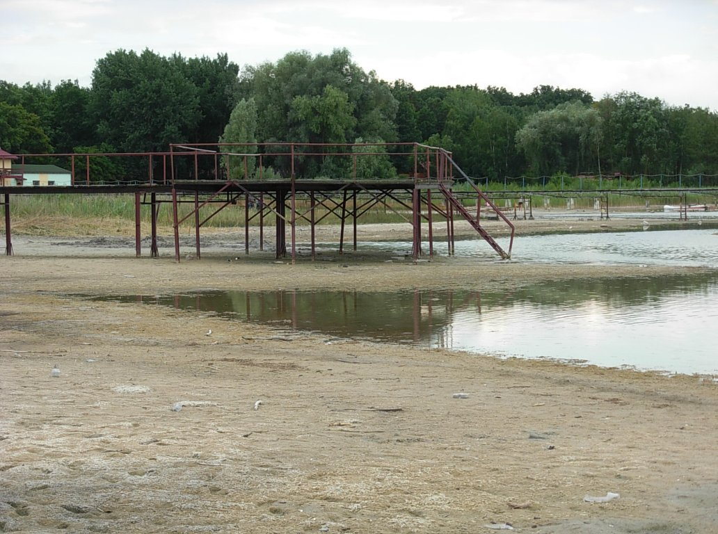 Jezioro Ostrowskie w Przyjezierzu